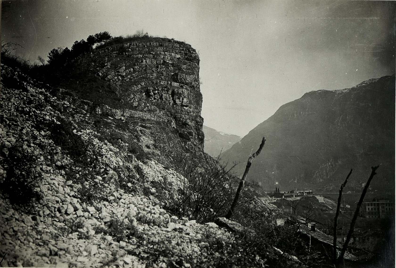 Monte Corona, Nomi.